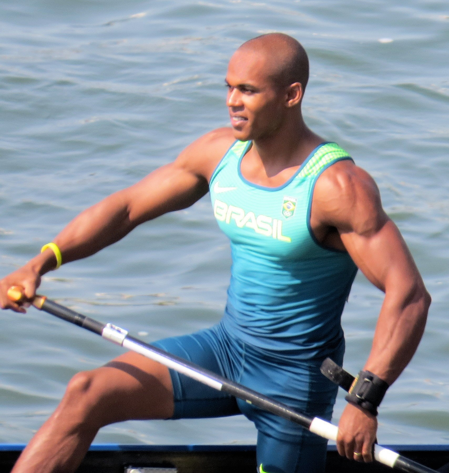 Rio 2016. Canoagem de velocidade/Canoe sprint